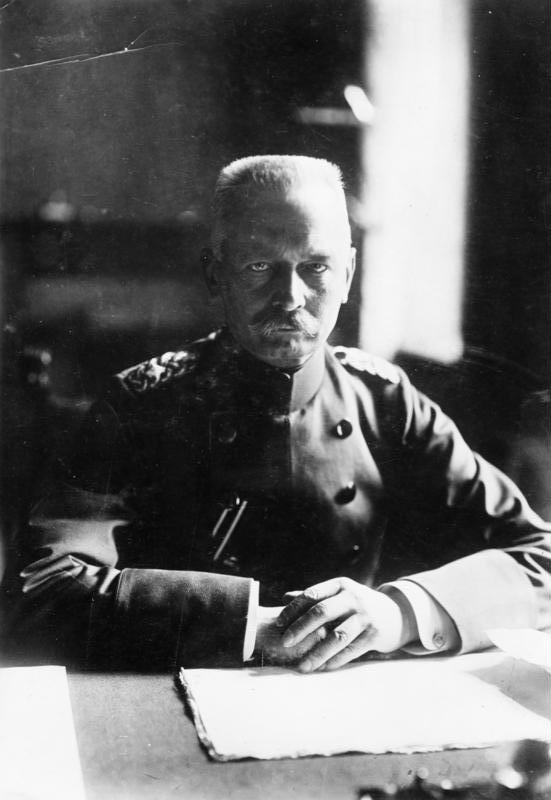 Erich von Falkenhayn Erich von Falkenhayn, 1913 General und Kriegsminister [Erich von Falkenhayn (Porträt)] Abgebildete Personen: Falkenhayn, Erich von: General, kaiserliches Heer, Deutschland